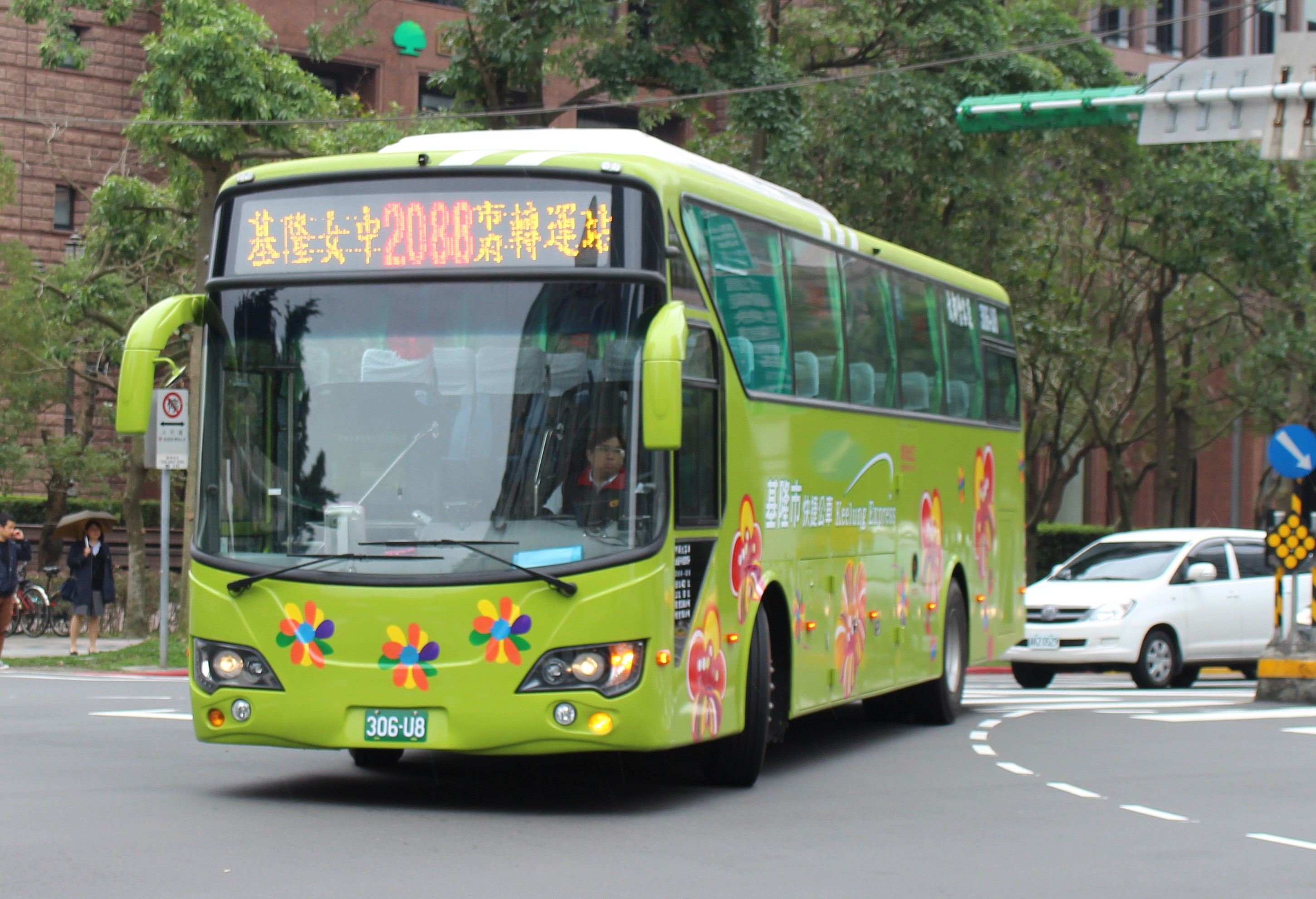 中文（台灣）: 大都會客運2016年固亞車體日野RN8JSVU-SSF大客車306-U8，仿馨盛車體，行駛2088線。